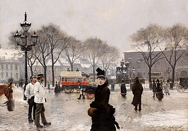 Kongens Nytorv set fra Hotel d'Angleterres Café. Kilde: Affotograferet maleri.